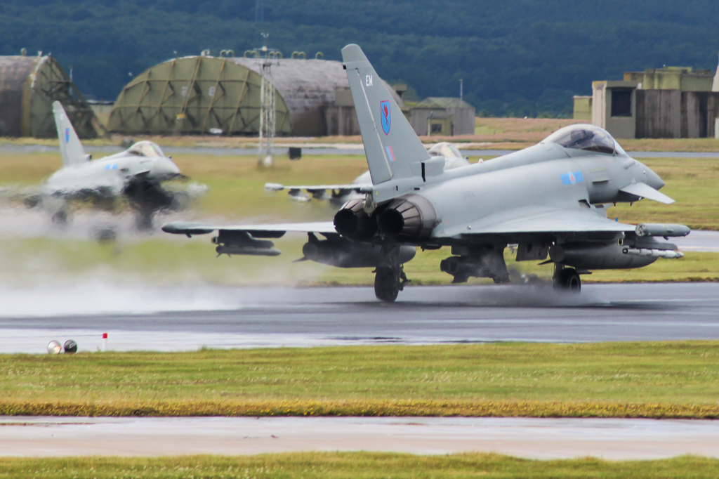 ZK312/EM